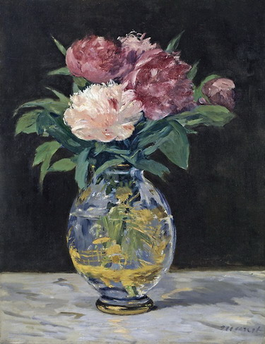 Едуар Мане Півонії на мармуровій столешниці 1882 (натюрморт з квітами)